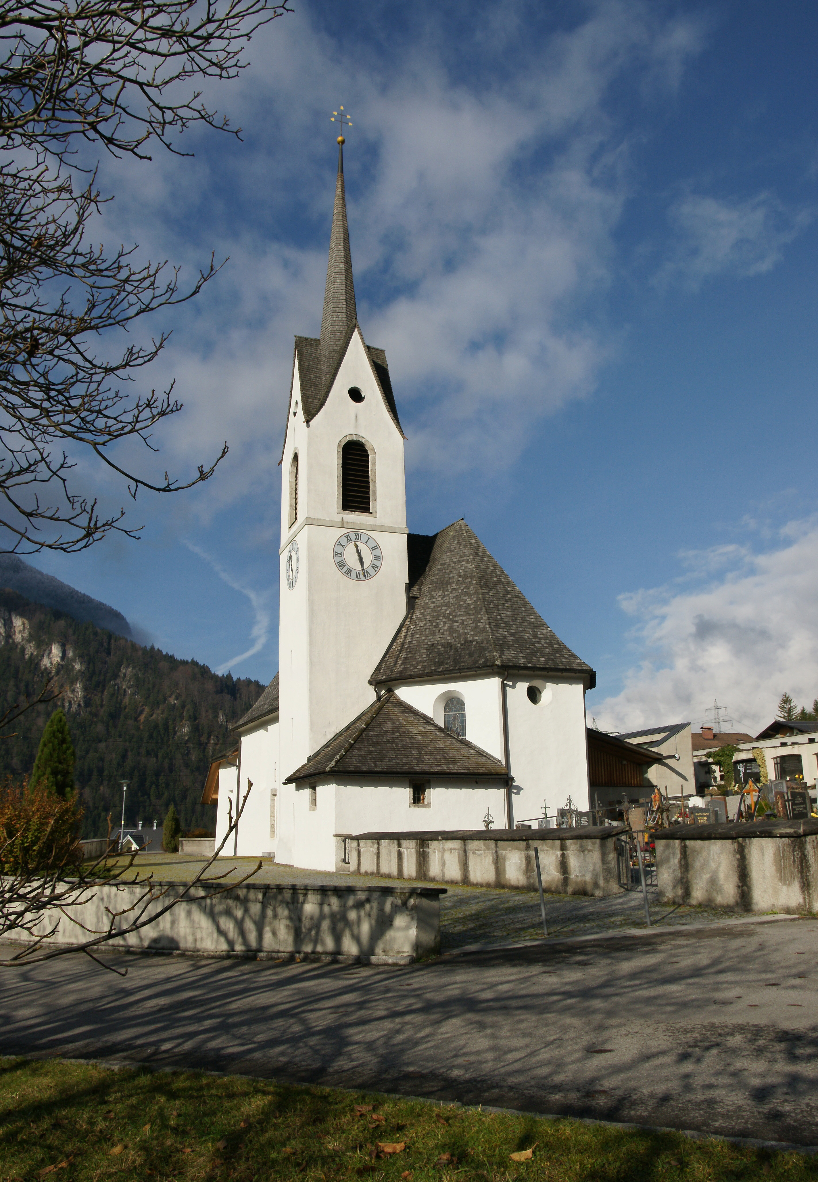 Pfarrkirche hl Antonius Eremit von Sankt Anton im Montafon, Vorarlberg.